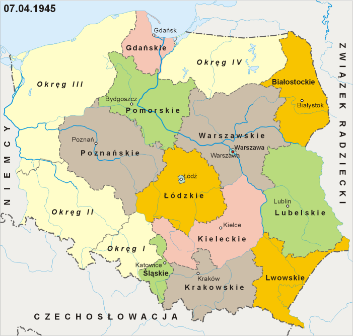 Podział administracyjny Polski w dniu 7 kwietnia 1945 Administrative division of Poland as of April 7, 1945